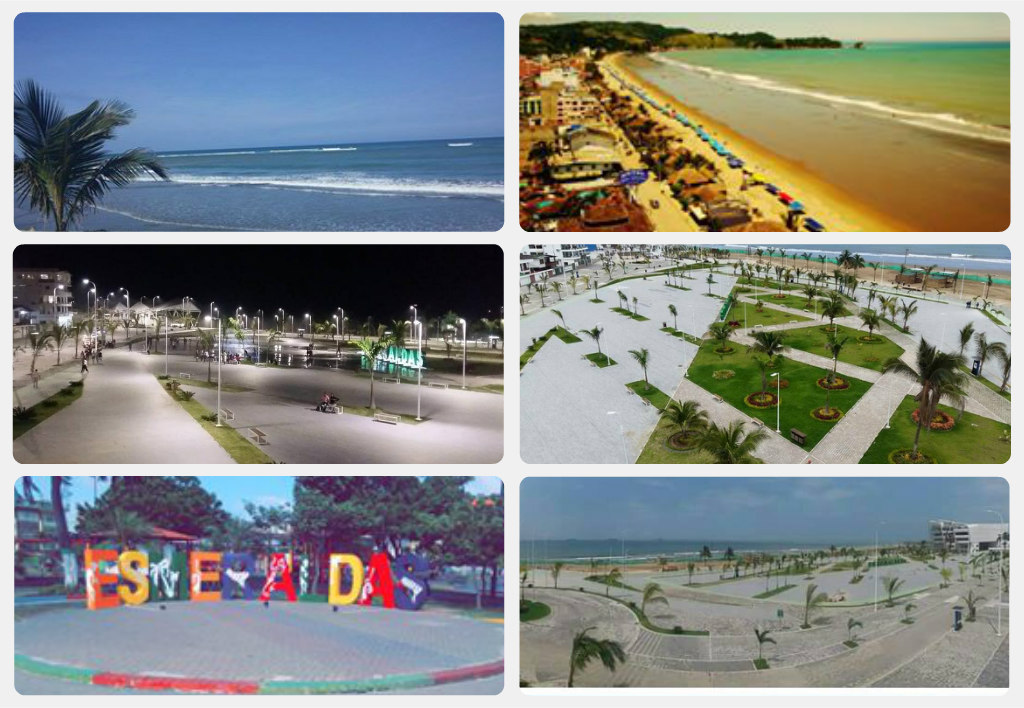 Lugares